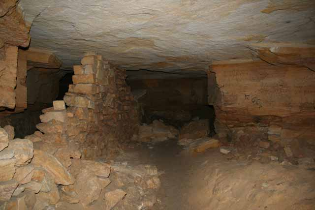 Odessa catacombs